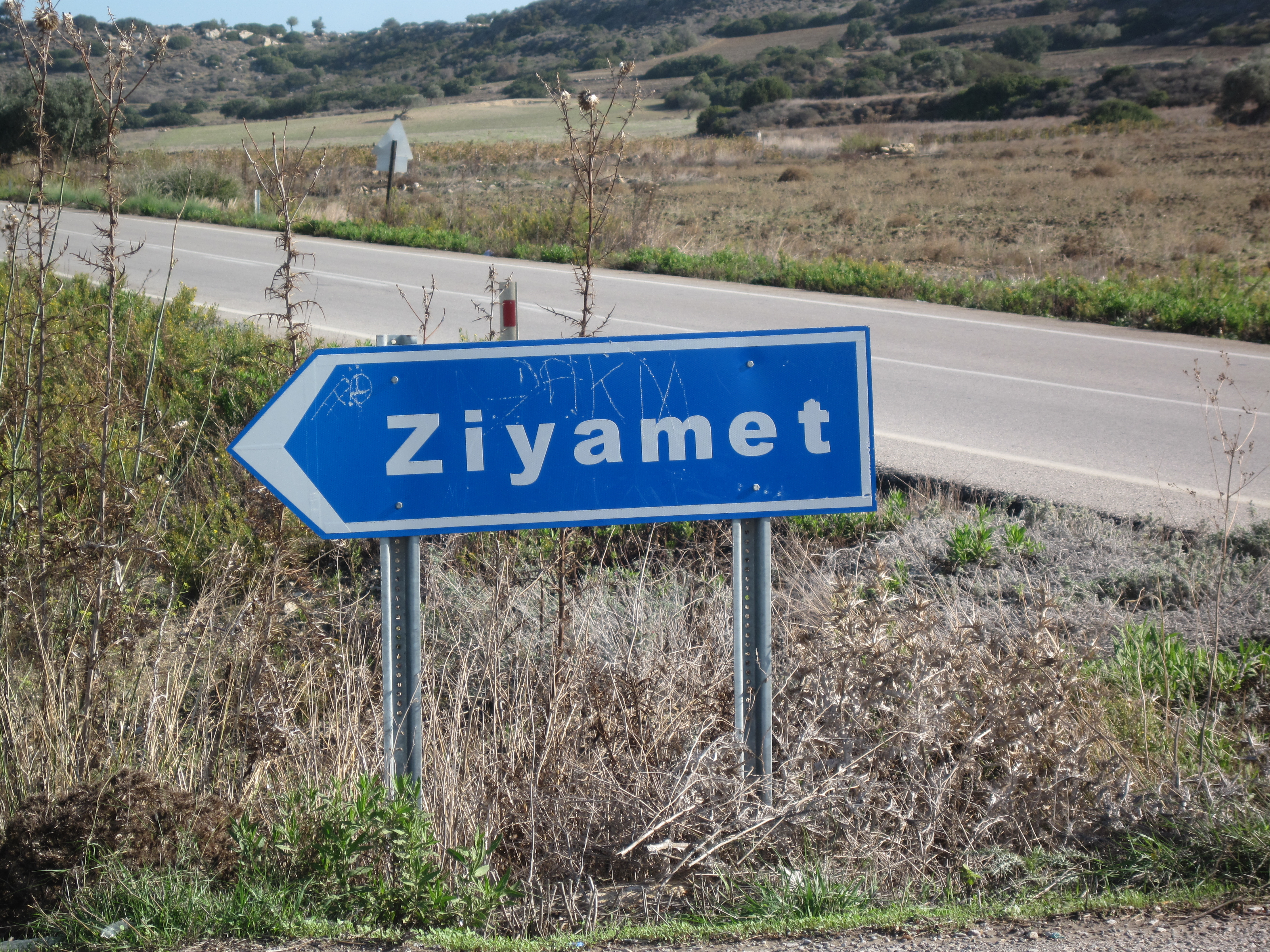 Zyamet (Leonarisso)